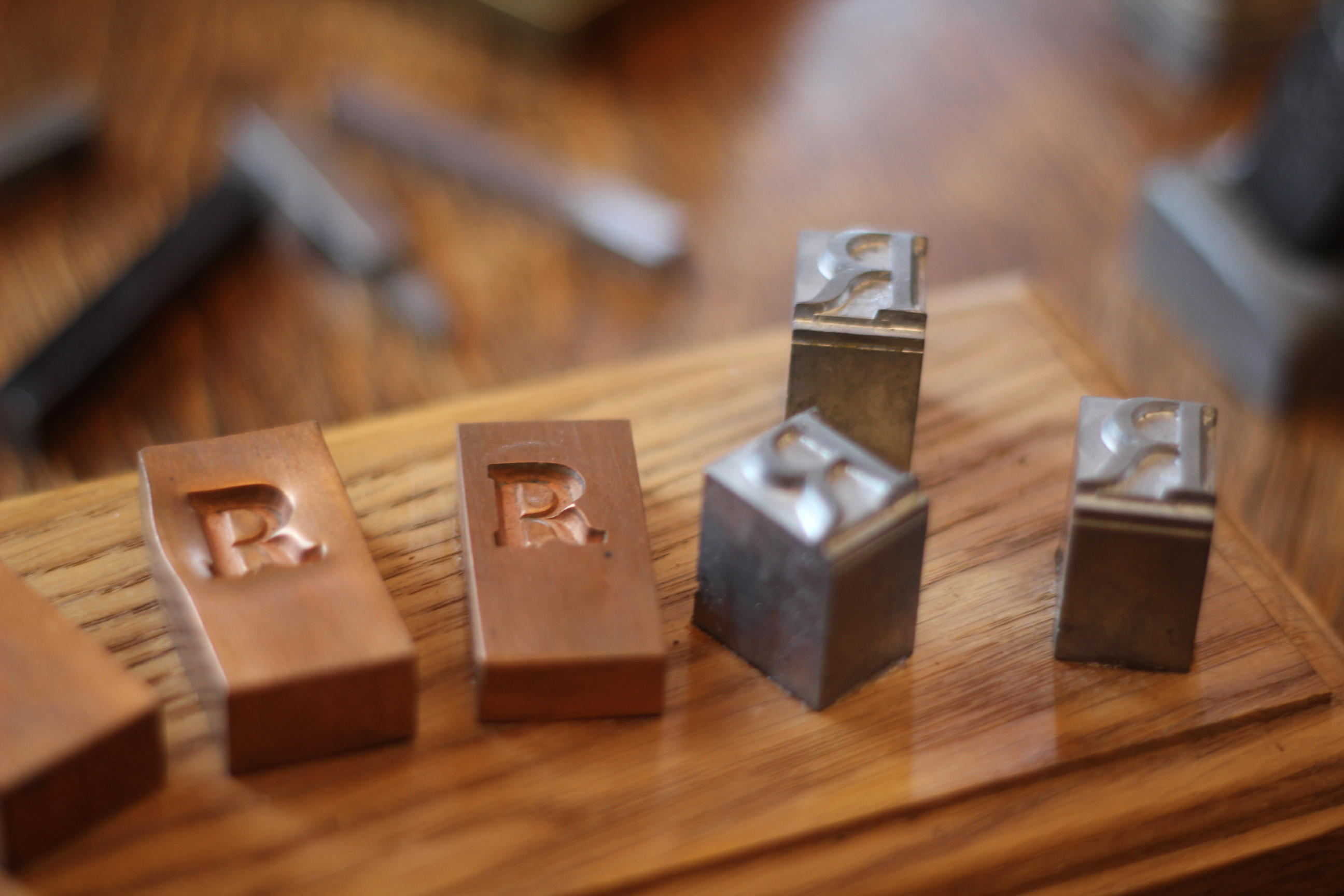 Matrices, the moulds used to cast the letter of metal type, and type cast from it (right). Description: Exposition Le Livre à la Renaissance, exposition des trésors de l'Imprimerie Nationale et de ses savoir-faire, pour Le Livre sur la Place de Nancy 2013.